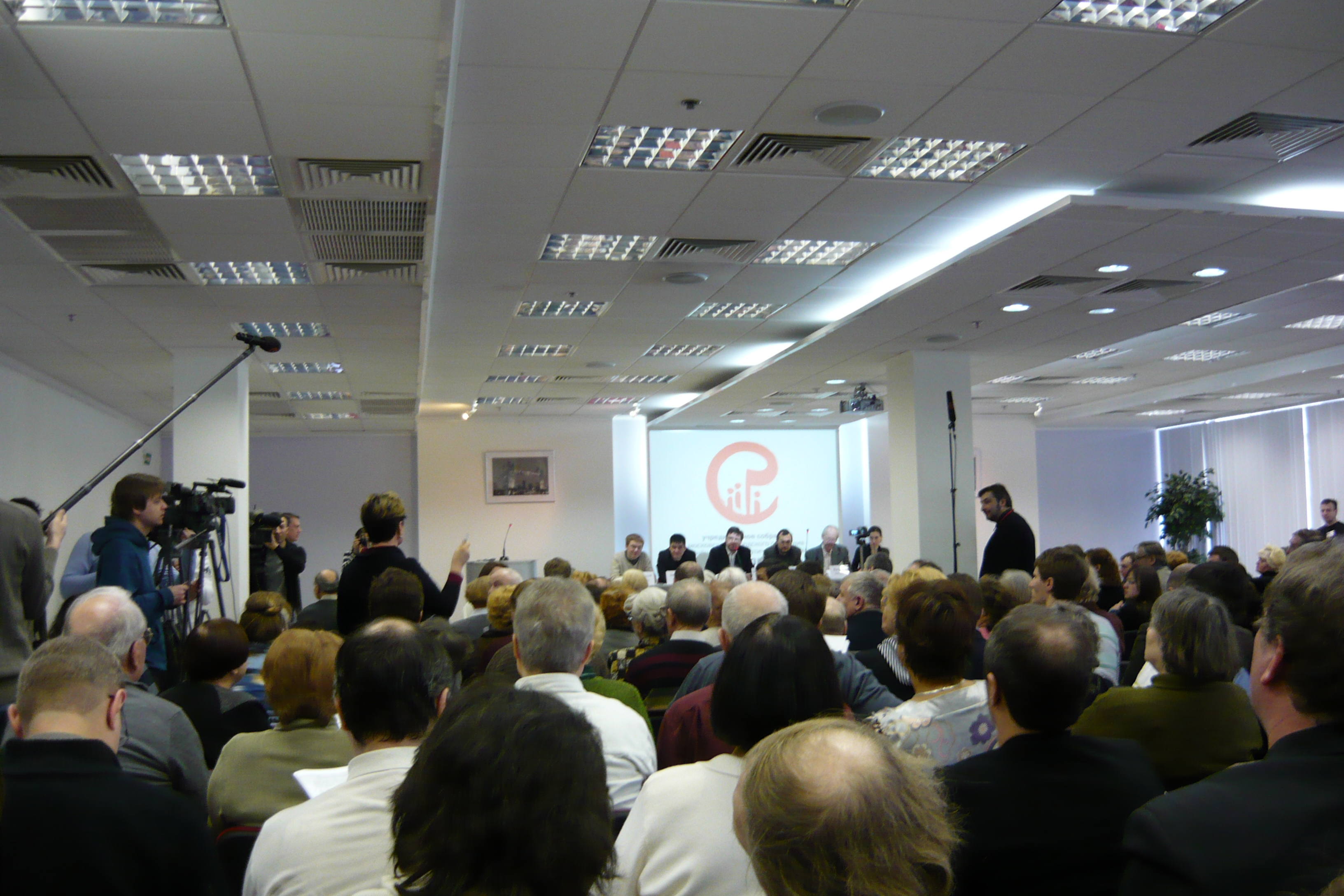 Учредительная конференция московского городского отделения движения Солидарность